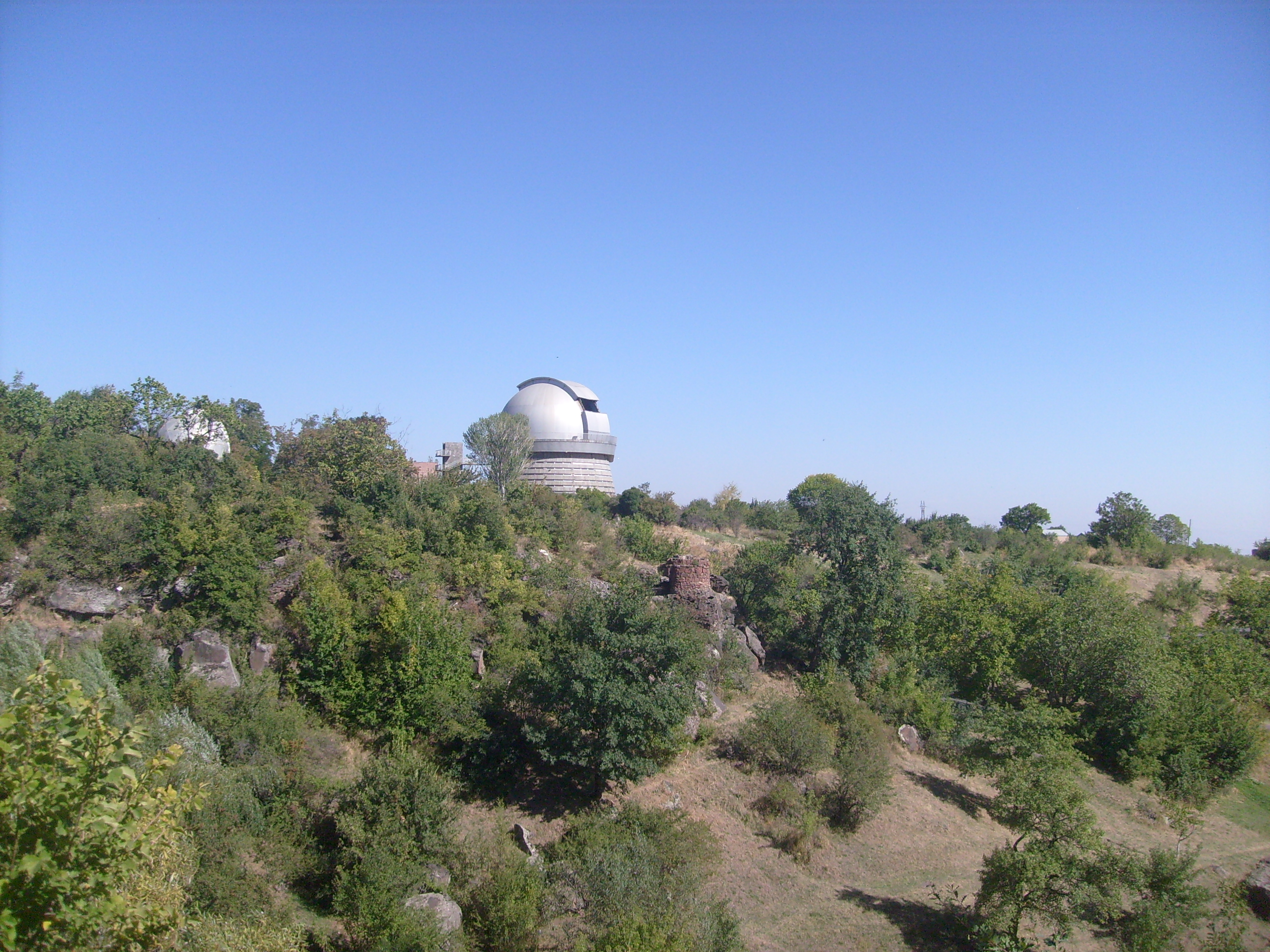 Բյուրականի աստղադիտարանի հիմնական դիտակի (2.6մ) շենքը 28/6